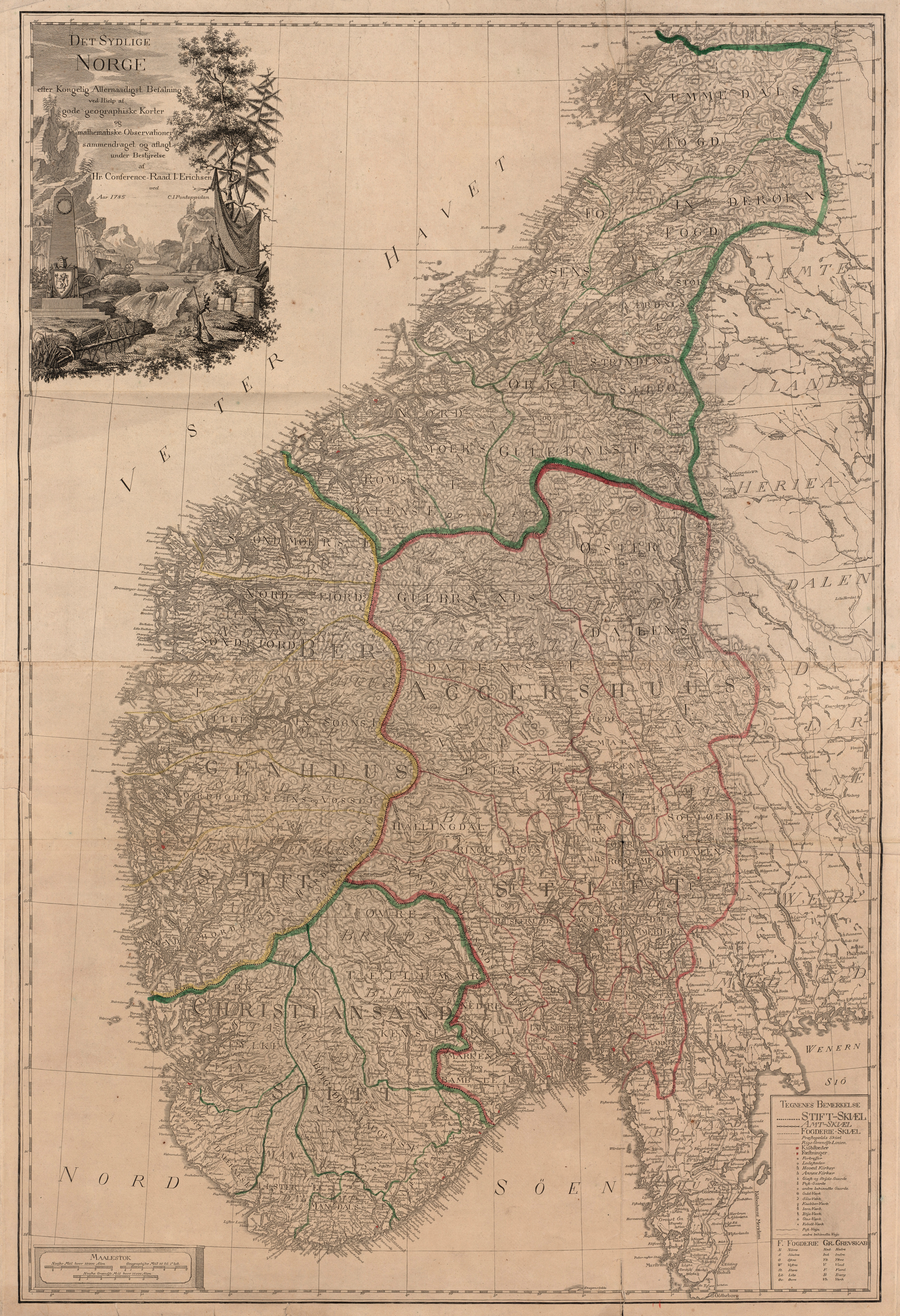 Kart fra Nasjonalbibliotekets kartsamling. Kartet er gitt ut i Kiøbenhavn (1785) og viser Sør-Norge.